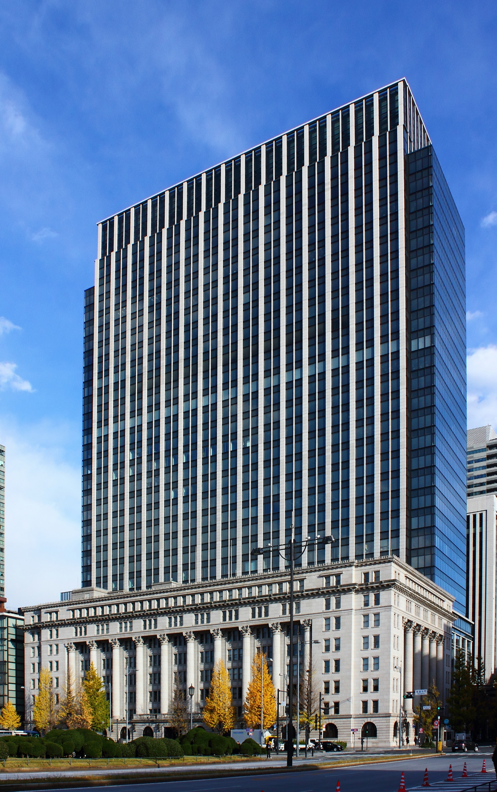 明治生命館（重要文化財）。明治安田生命本社ビル。東京都千代田区